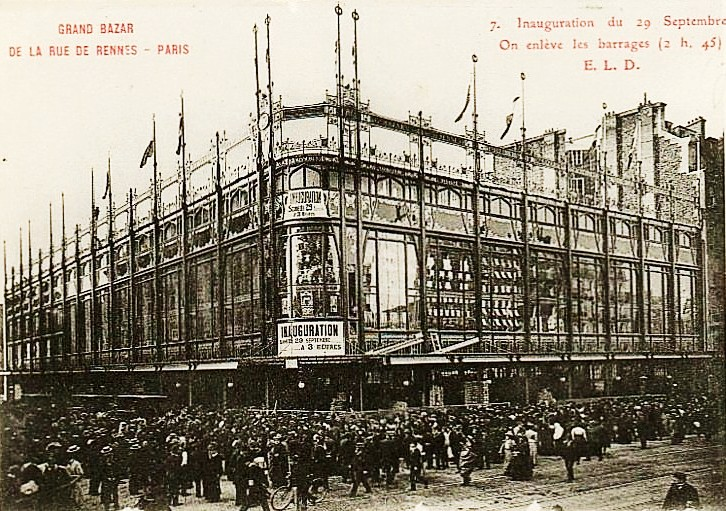 Carte postale de 1909 du Gd Bazar rue de Rennes à Paris (également appelé Magasins Réunis), domaine public.